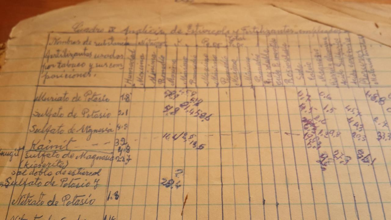 swd